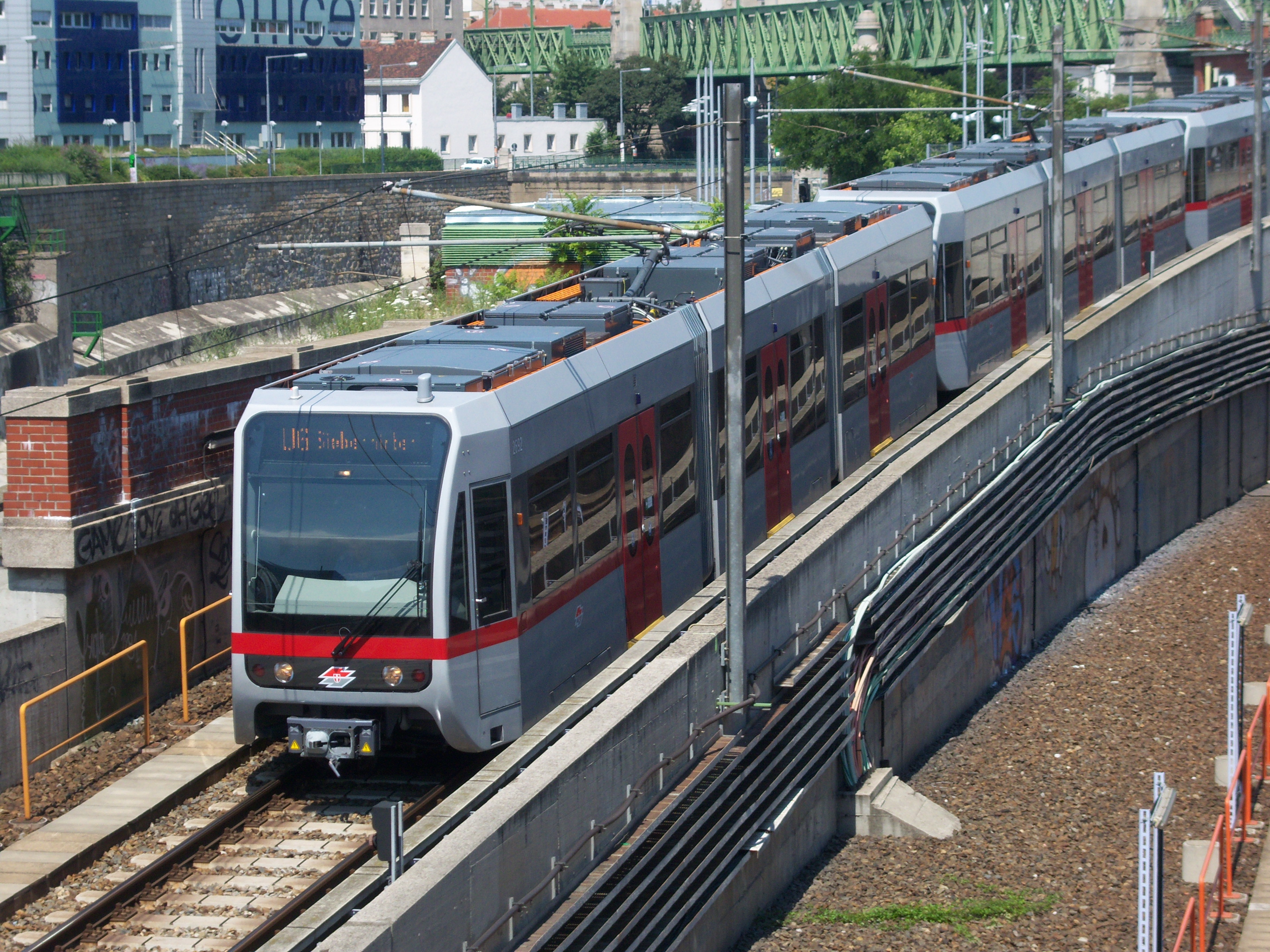 Typ T1 der U6 bei der Einfahrt in die Station Längenfeldgasse